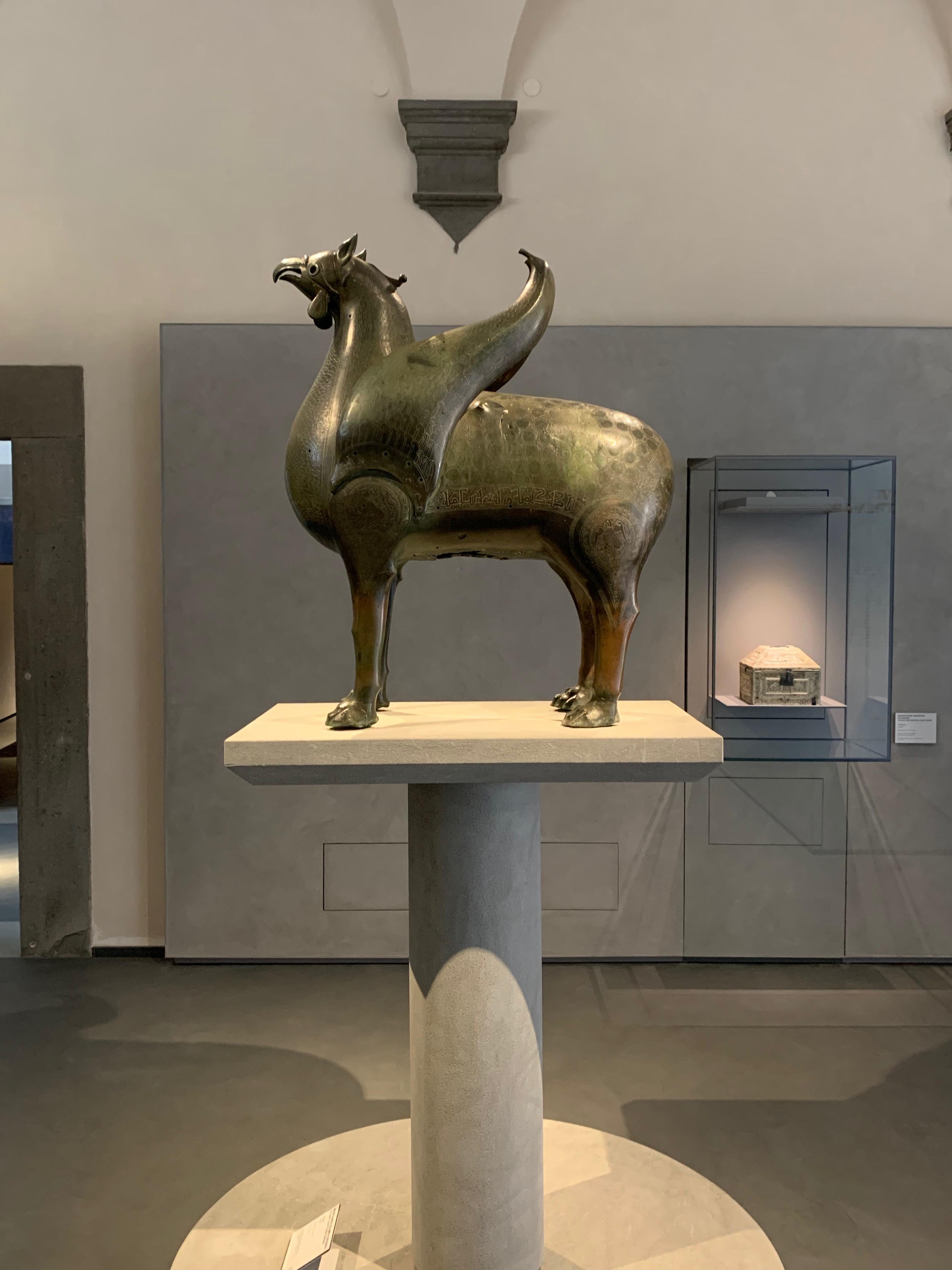 Grifone di Pisa al nuovo museo dell'opera del Duomo di Pisa